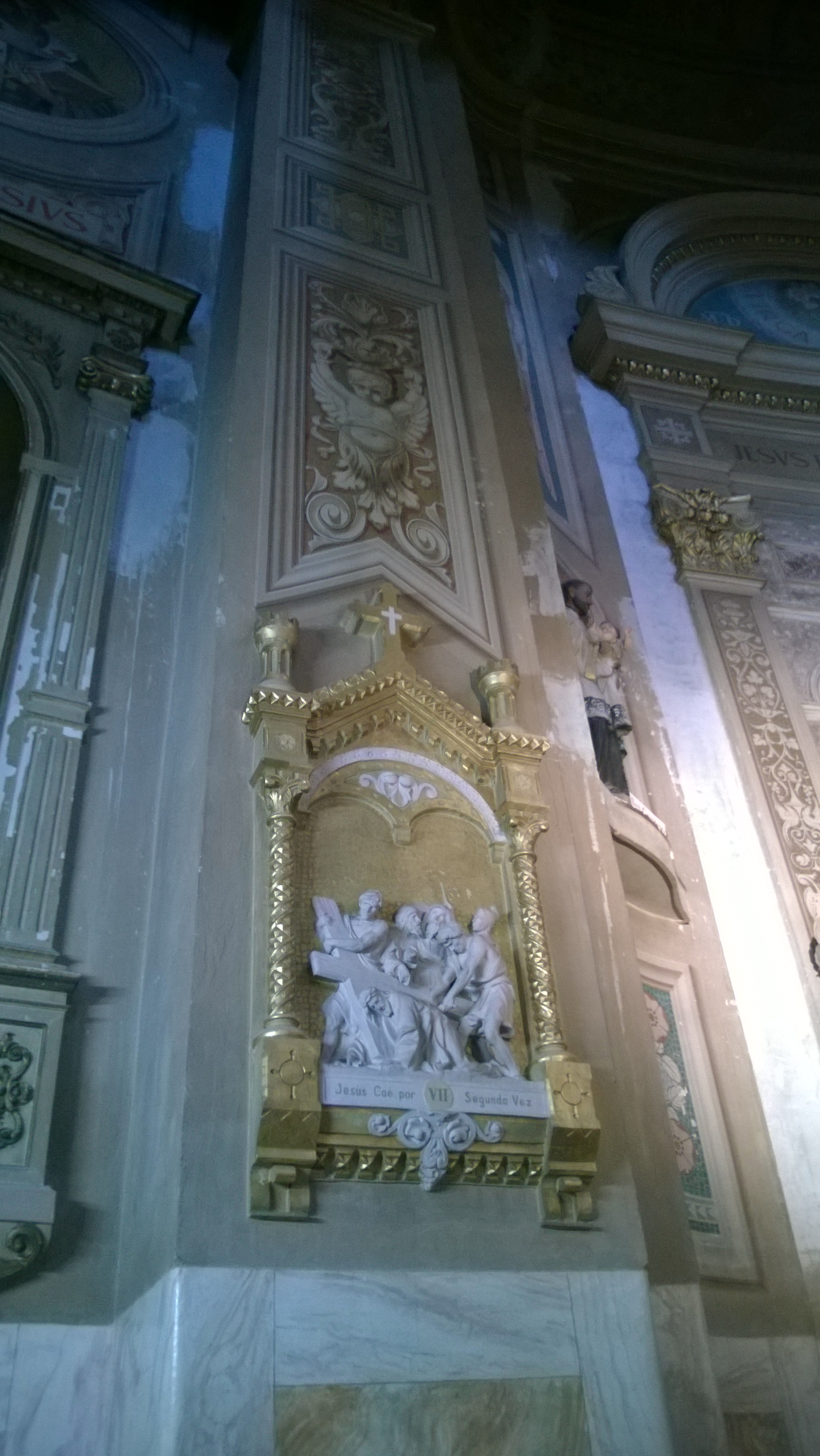 Detalle de uno de los muros.